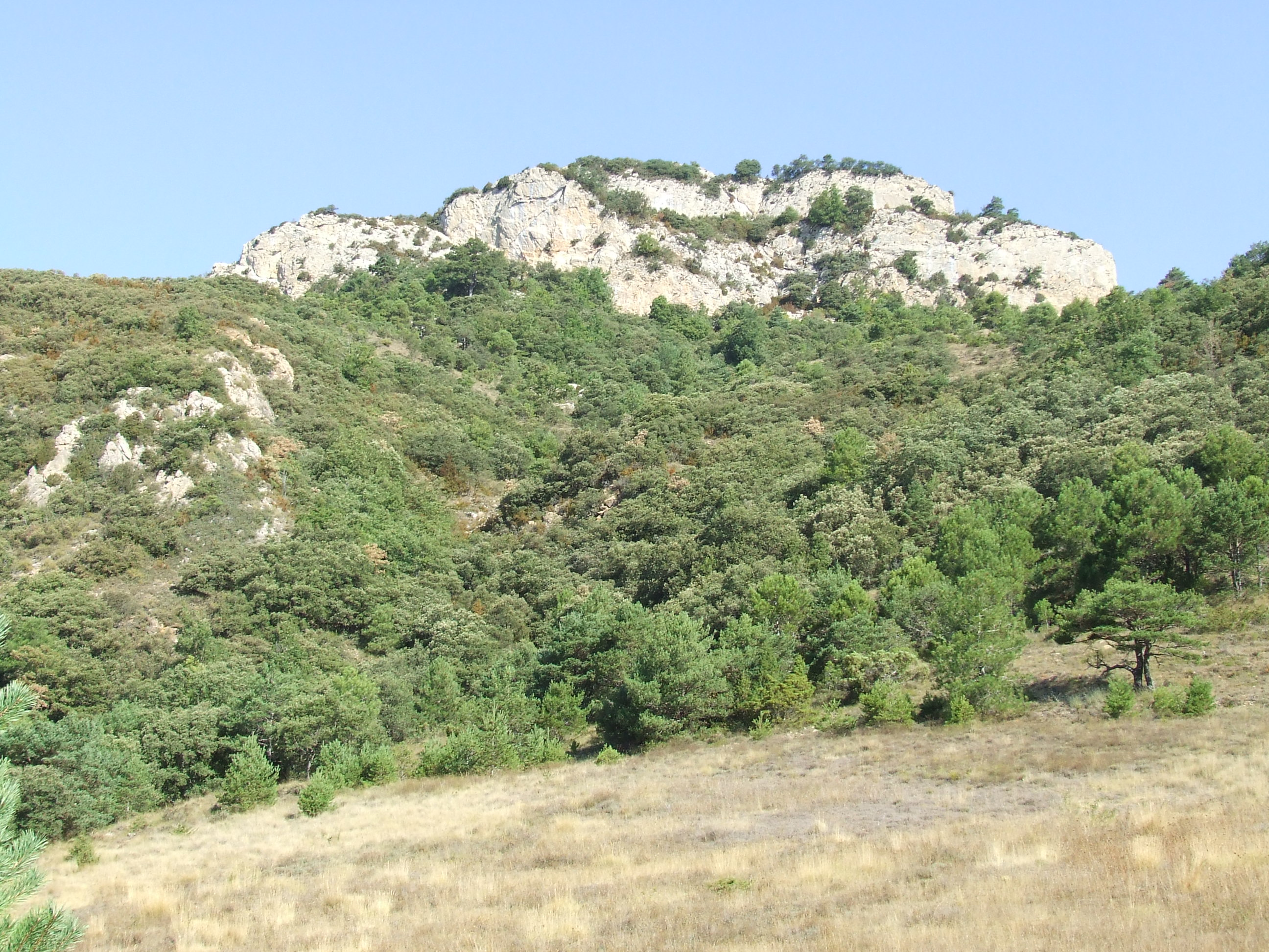 La Sedella de Ca l'Arte (Faidella, Abella de la Conca, Pallars Jussà)